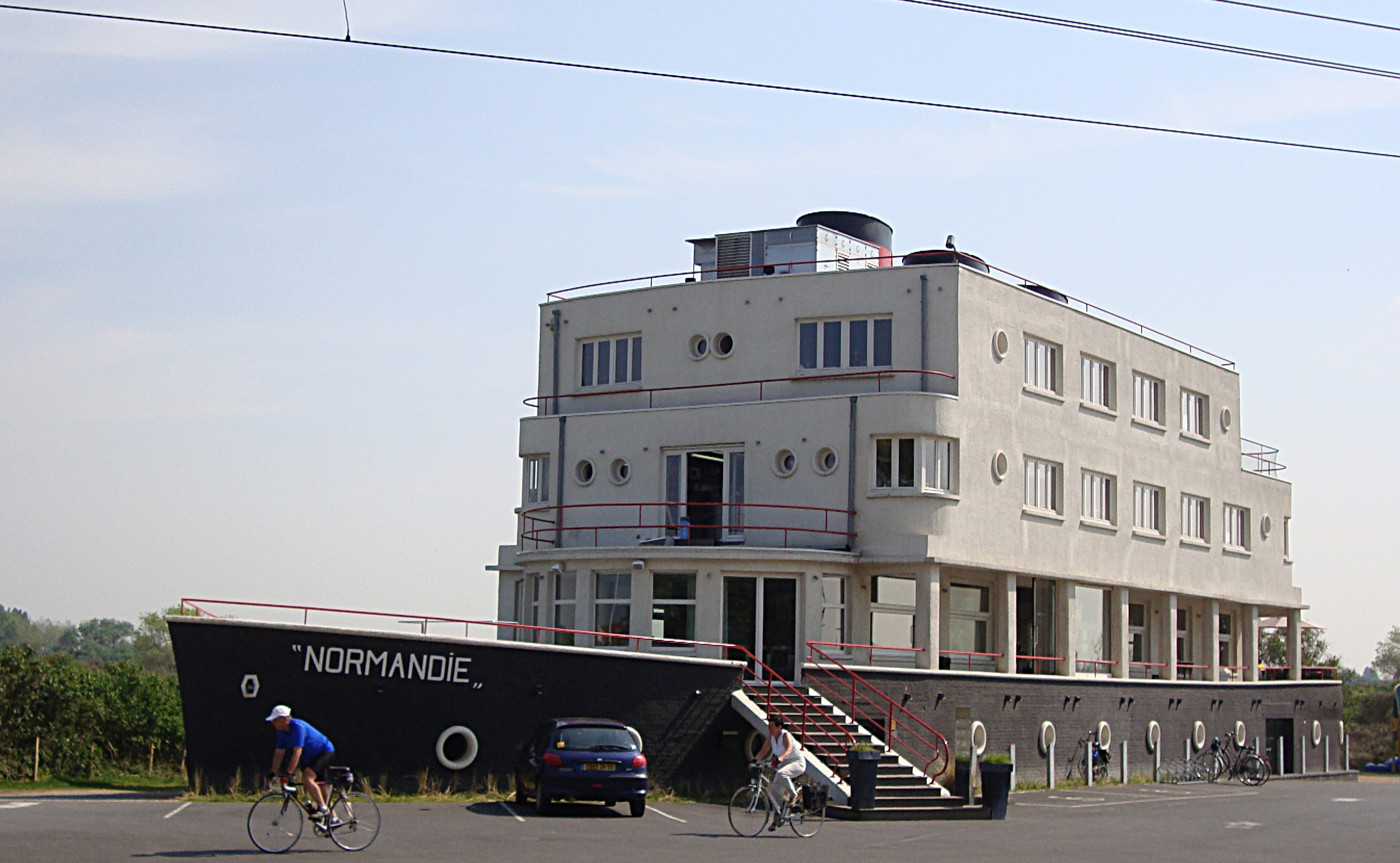 Hotel Normandie à Koksijde (Belgique)